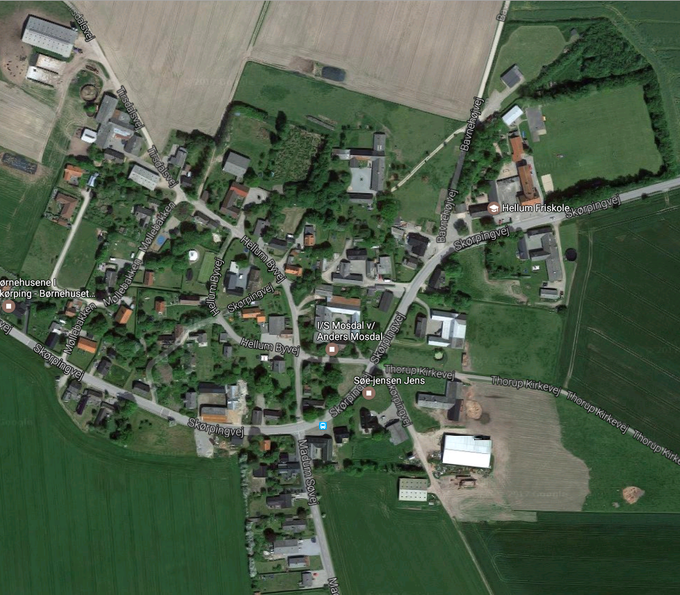 jord kort over Hellum by i Nordjylland Danmark